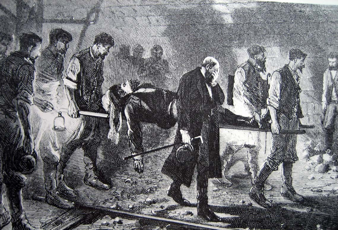 Tod des Ingenieurs Louis Favre im Gotthardtunnel im Jahr 1879.